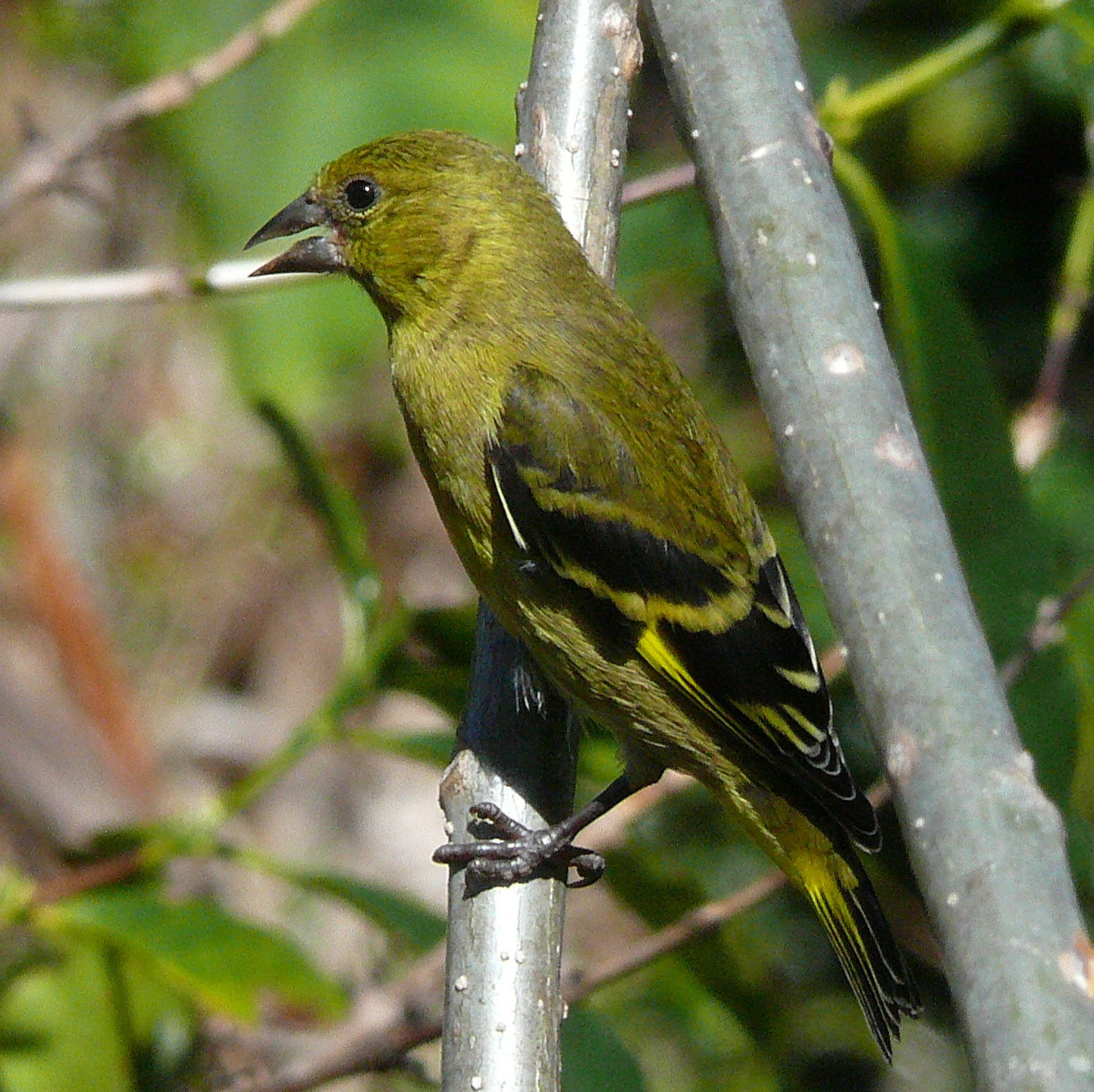 Magellanzeisig (Carduelis magellanica)